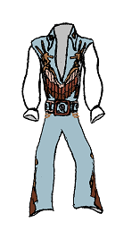 Blue Egyptian Bird (Elvis)